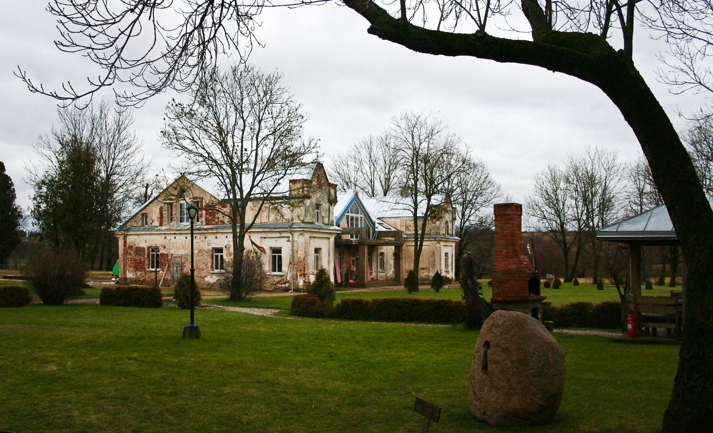 Žemaitkiemis Manor ir Babtai elderate, Lithuania